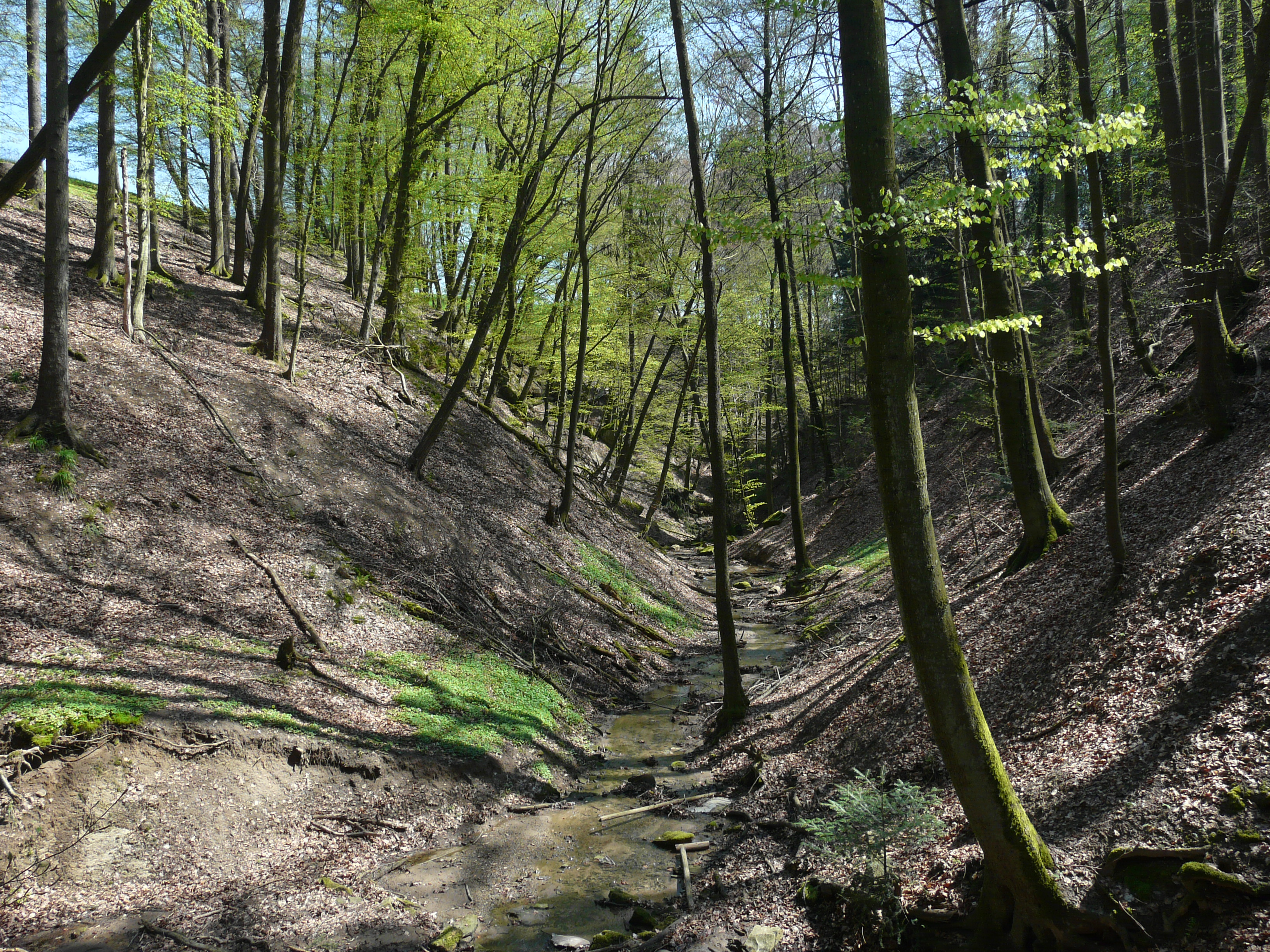 Räthschlucht, südlich von Altdorf bei Prackenfels